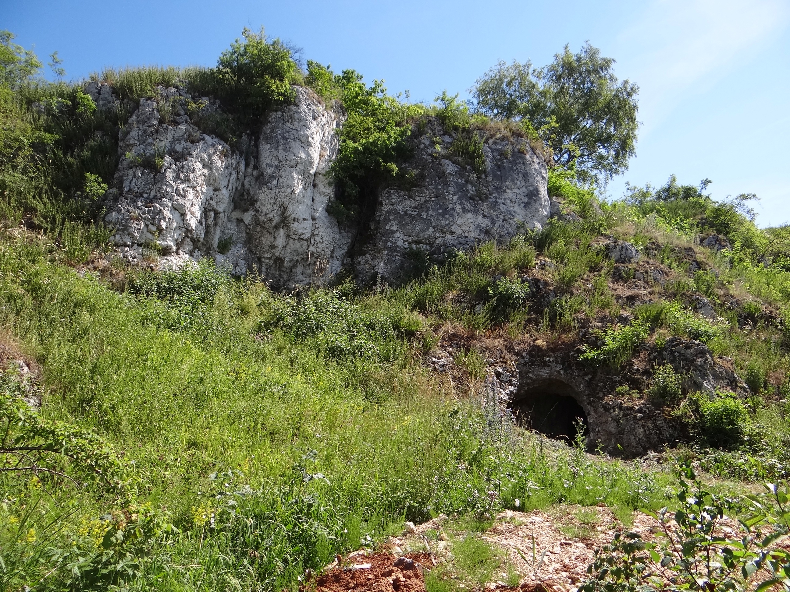 Schronisko Dolne w Żytniej Skale. Nad nim otwór Schrinsika nad Dolnym w Żytniej Skale